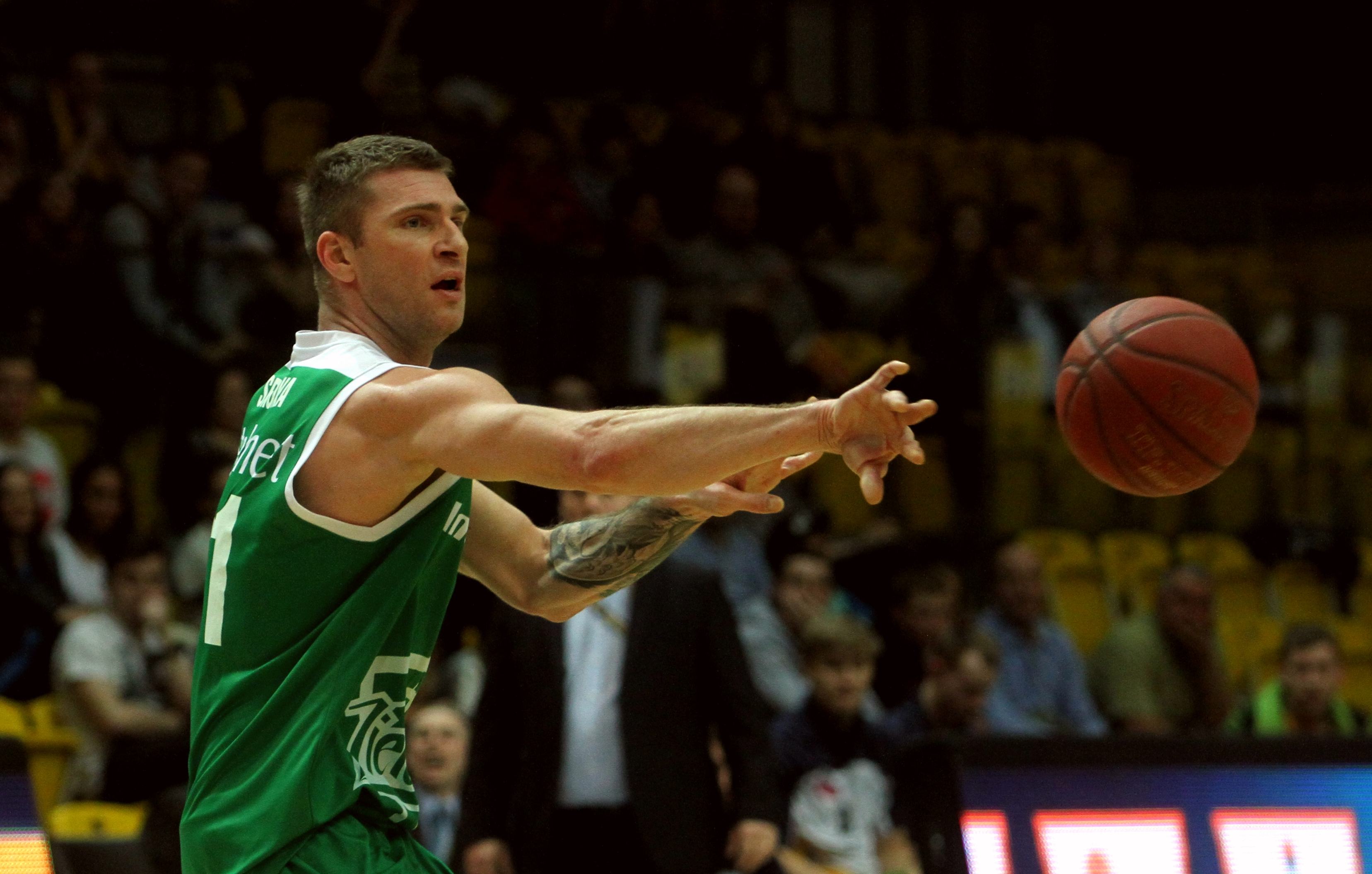 Marcin Sroka Stelmet Zielona Góra